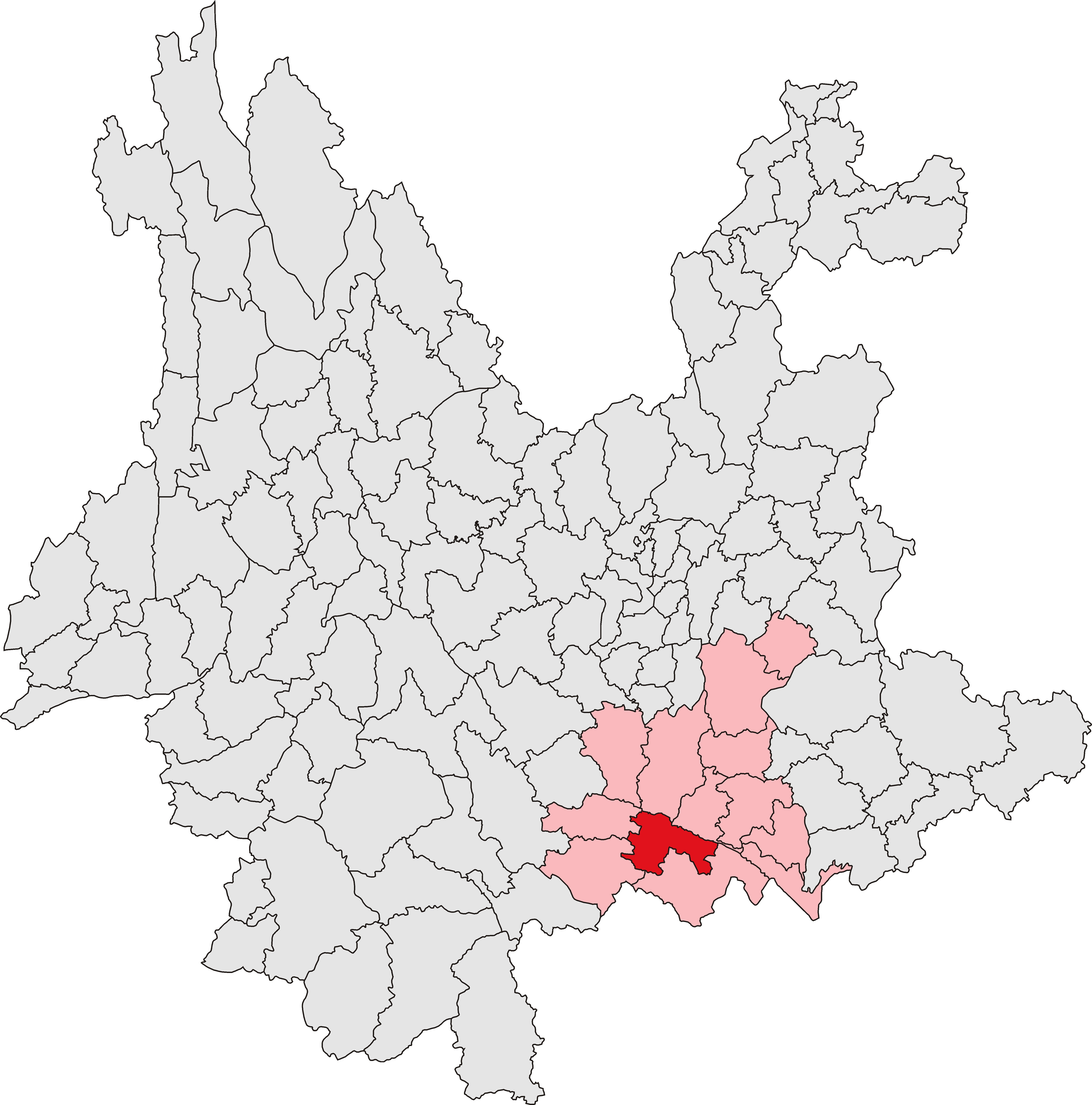 元阳县位置图